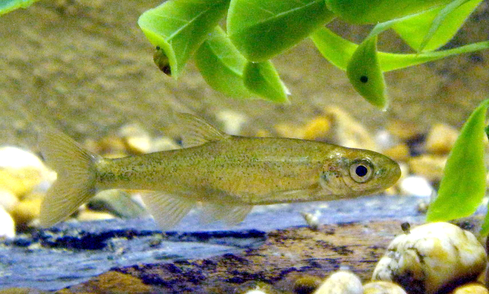 Jarabugo (Anaecypris hispanica), en Centro de Acuicultura Las Vegas del Guadiana (Badajoz, Spain)